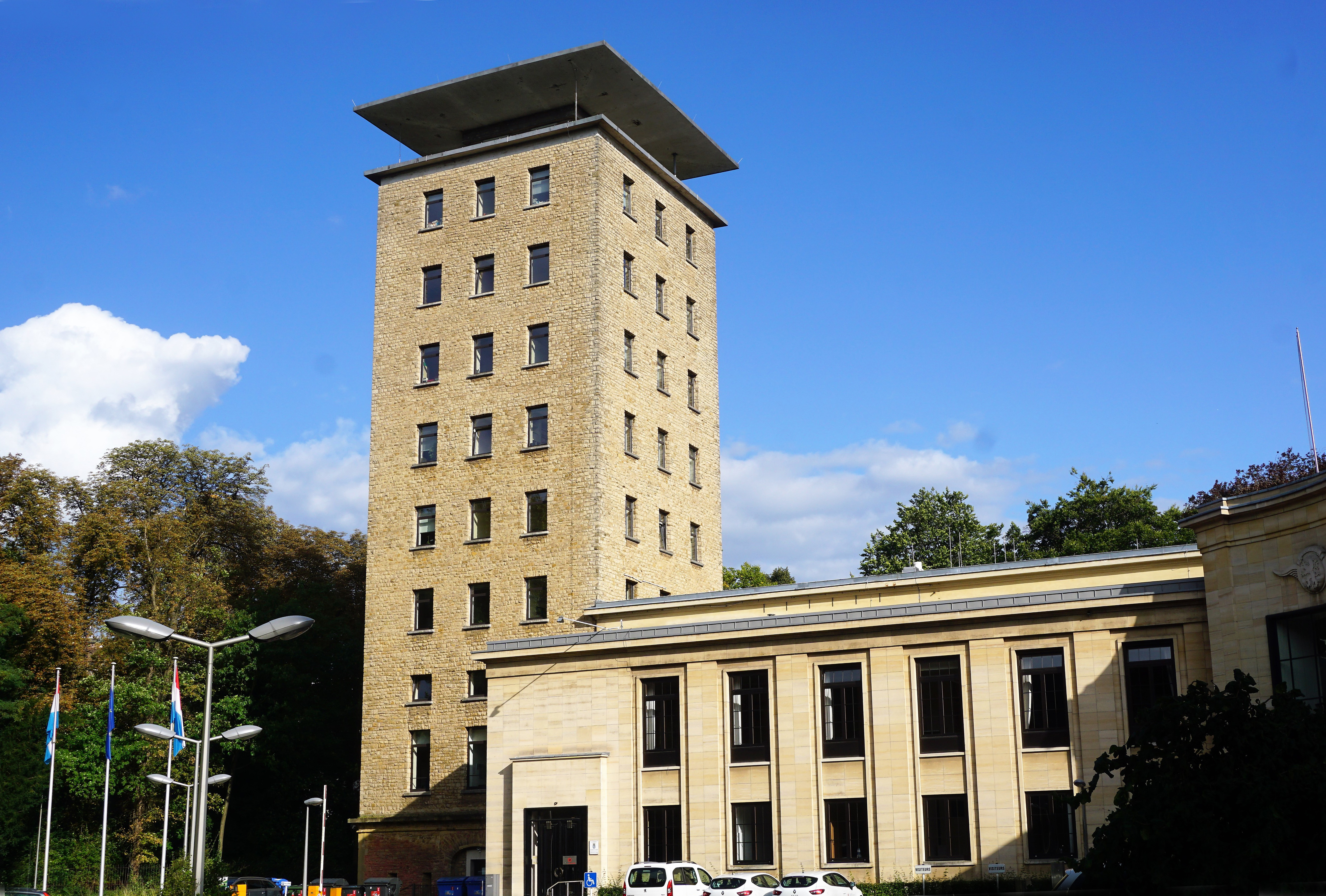 Luxembourg, la Villa Louvigny, siège du Ministère de la Santé, au parc municipal de Luxembourg